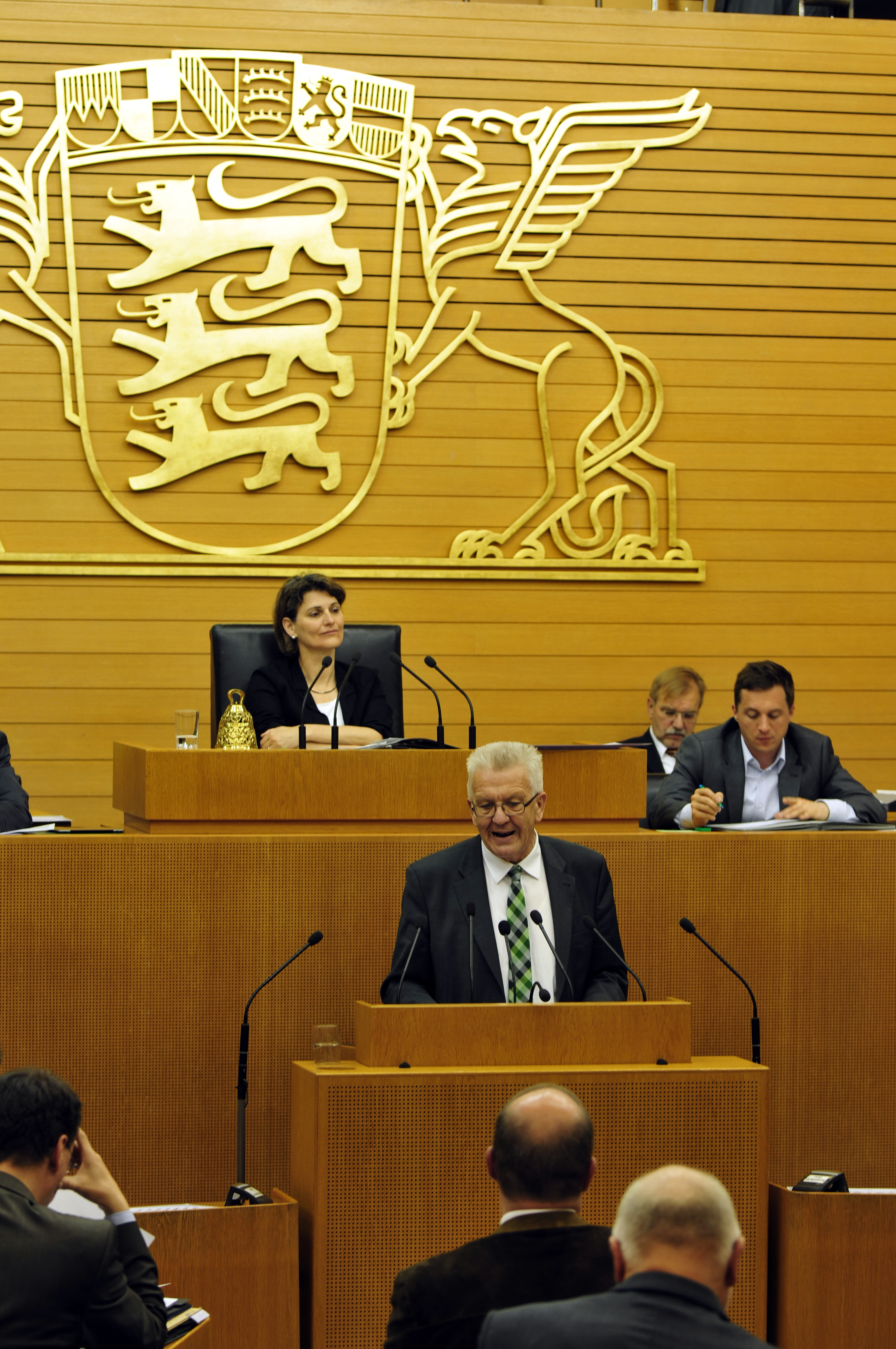 Landtagsprojekt Baden-Württemberg 2003